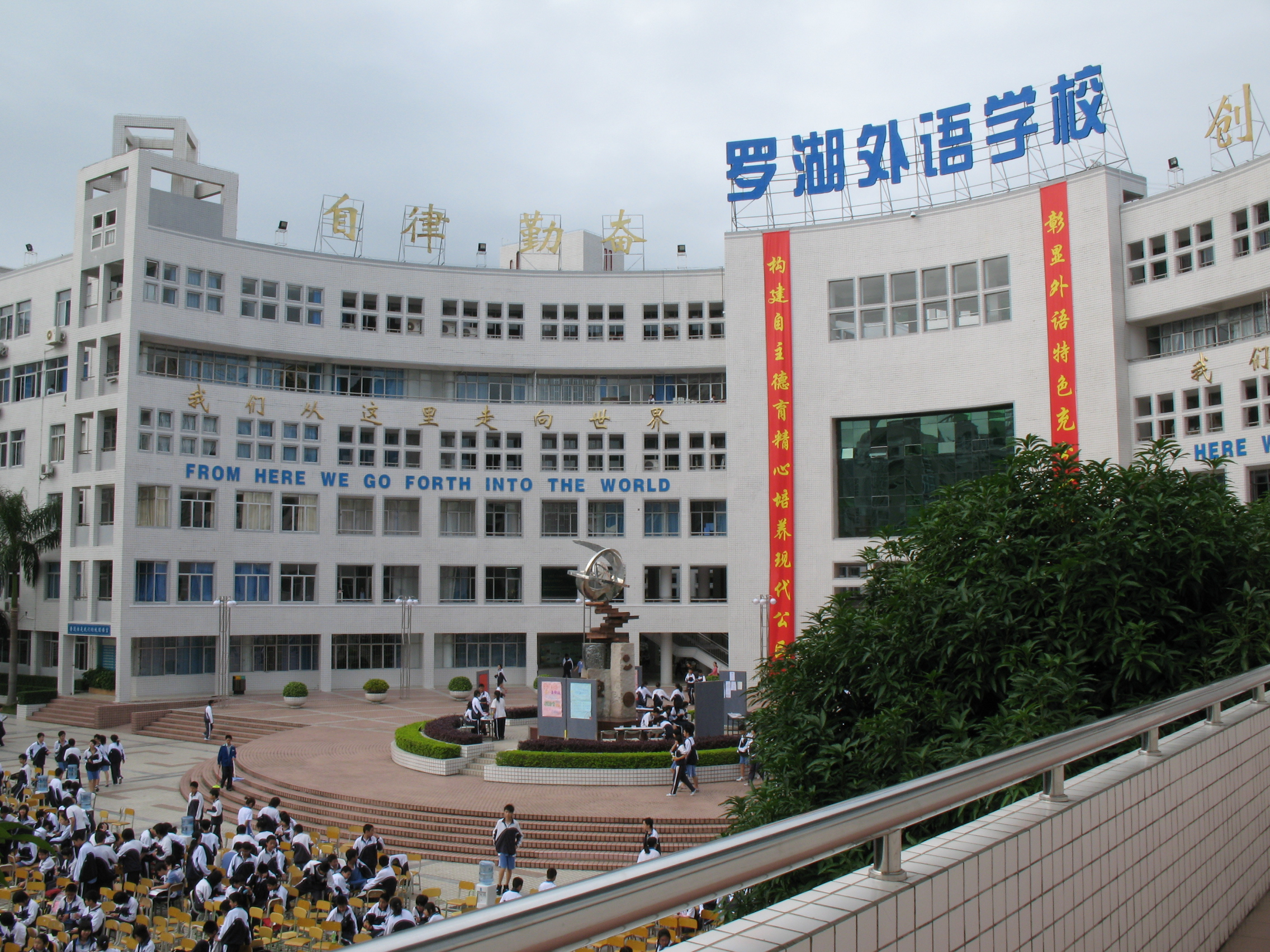 lhfls look